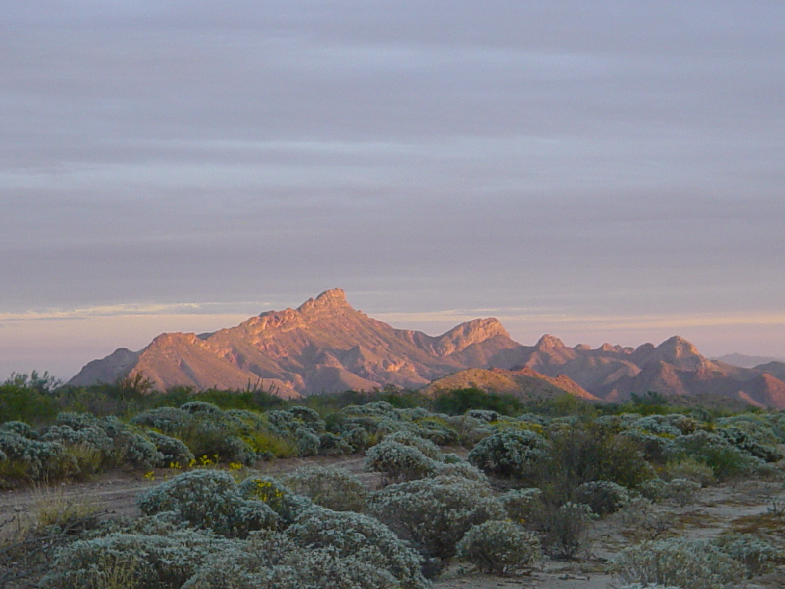 paisaje / landscape en la zona seri Sonora Mexico